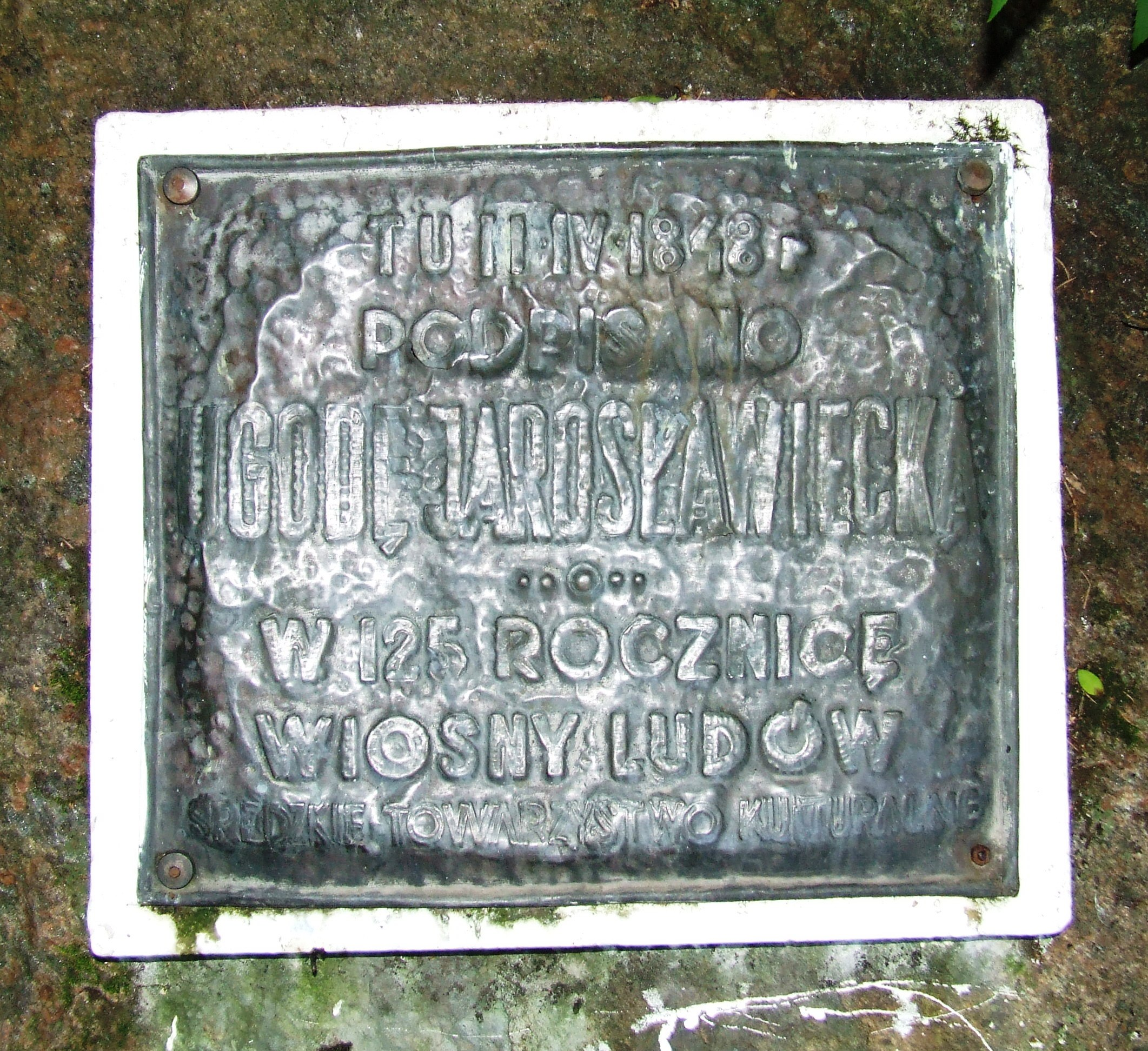 Tablica pamiątkowa w Jarosławcu (powiat średzki) upamiętniająca ugodę jarosławiecką z 1848 roku.